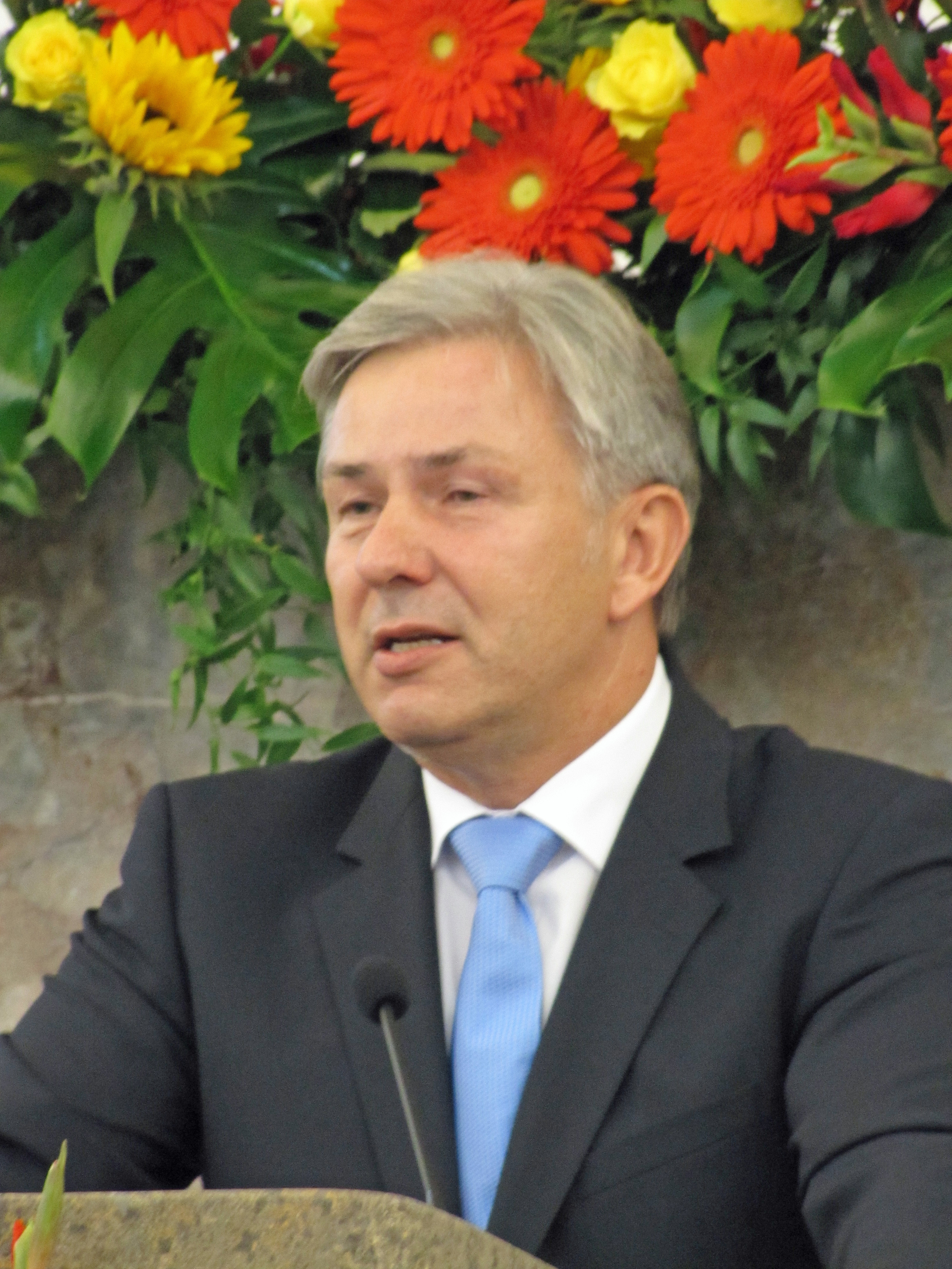 Klaus Wowereit, 2012 als Festredner zum Tag der Deutschen Einheit in der Frankfurter Paulskirche.